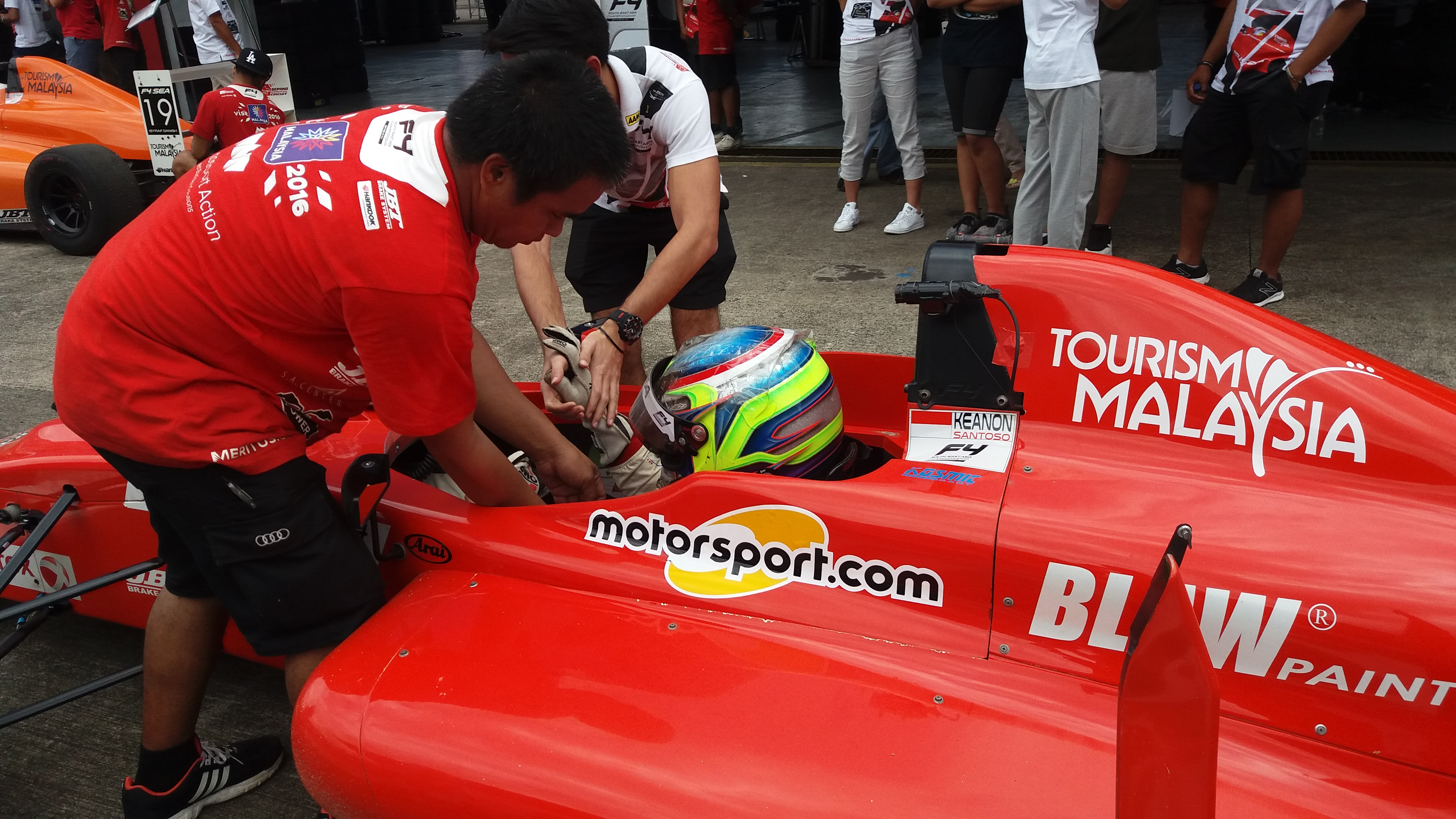 Keanon Santoso di Sirkuit Sentul, 2016